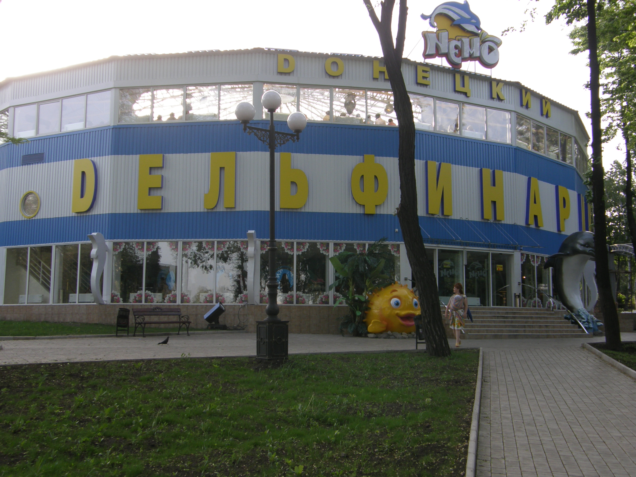 Парк Щербакова в Донецке